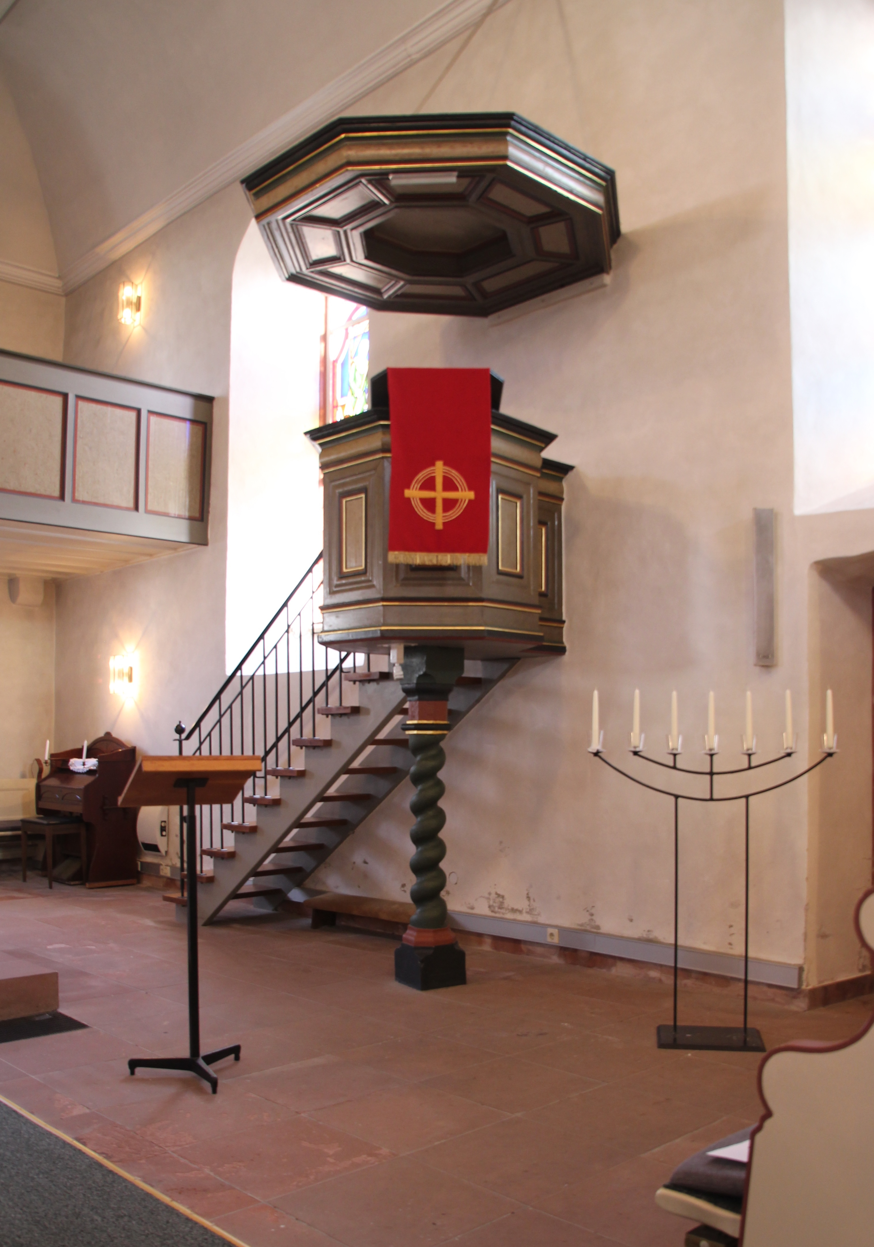 Ev. Kirche Erbstadt